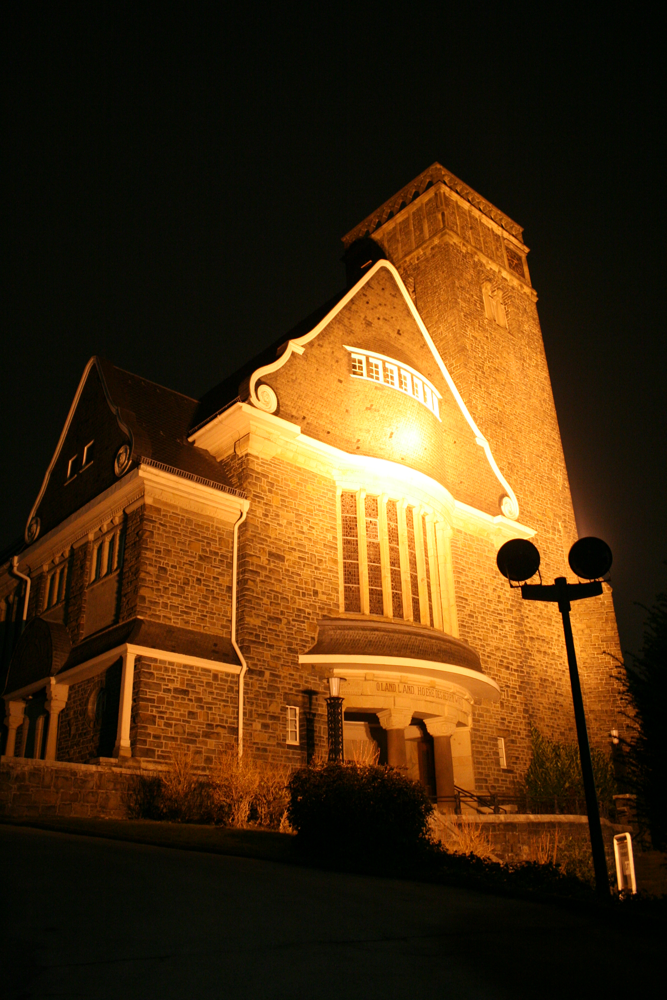 Beschreibung: Sonnborner Hauptkirche in Wuppertal Quelle: Selbst erstellt Datum: 06.Januar 2006/ 22.Februar 2007 Autor: Thomas Kathöfer